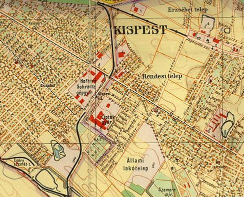 A Hofherr és Schrantz Gépgyár egy régi térképen